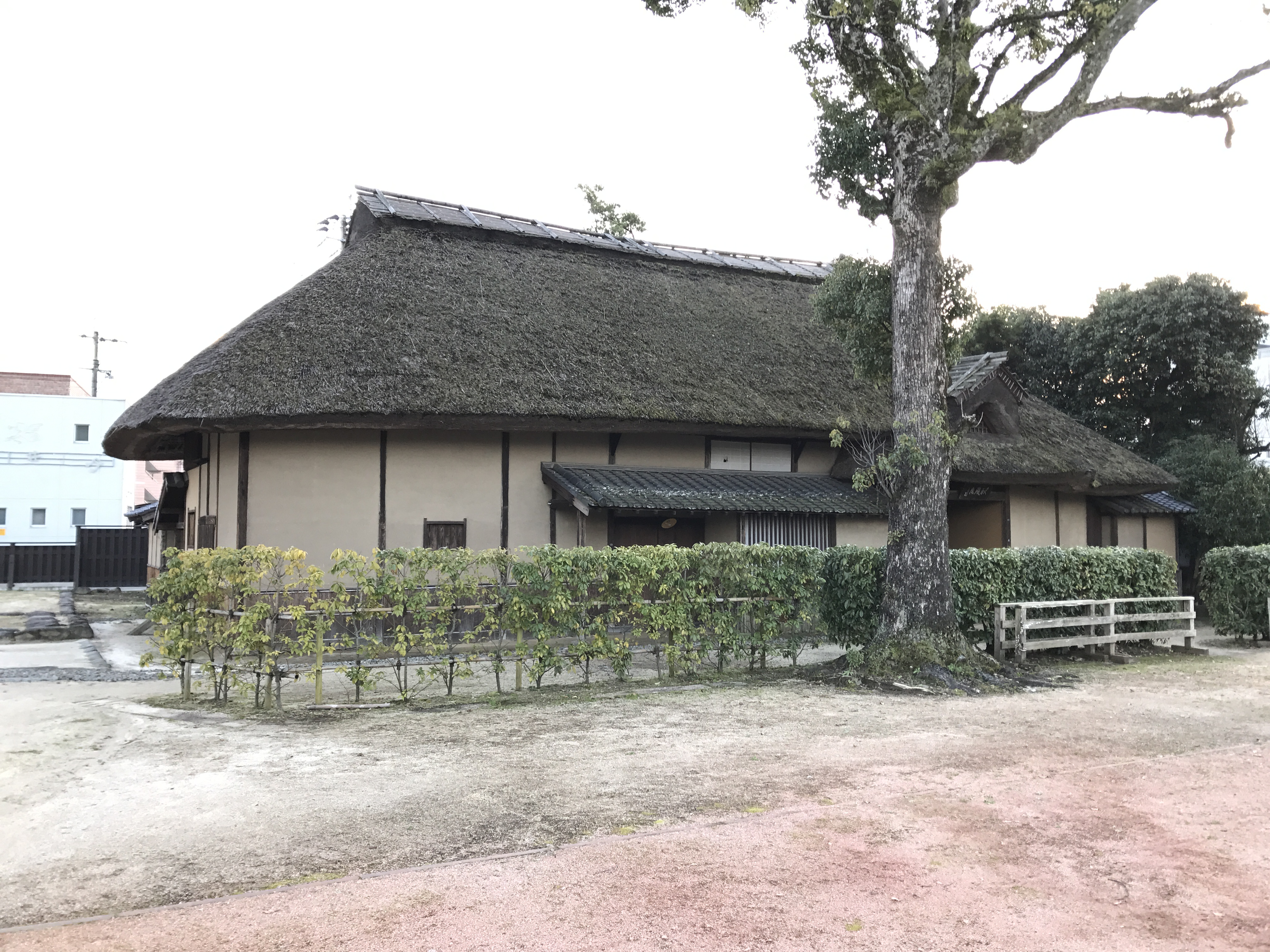 咸宜園跡・秋風庵